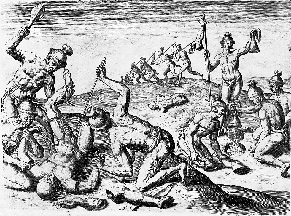 Quinzième planche gravée par Théodore de Bry d'après les dessins de Le Moyne qui représente la scalpation, le séchage du scalp et son port comme ornement (1591). Au premier plan à gauche, trois Indiens ont scalpé un ennemi mort; l'un découpe les muscles de son bras gauche, un deuxième frappe sa jambe gauche, tandis qu'un troisième introduit une flèche dans son anus. Au second plan à droite, quatre Indiens travaillent auprès d'un feu pour faire sécher le scalp; un quatrième brandit un scalp.